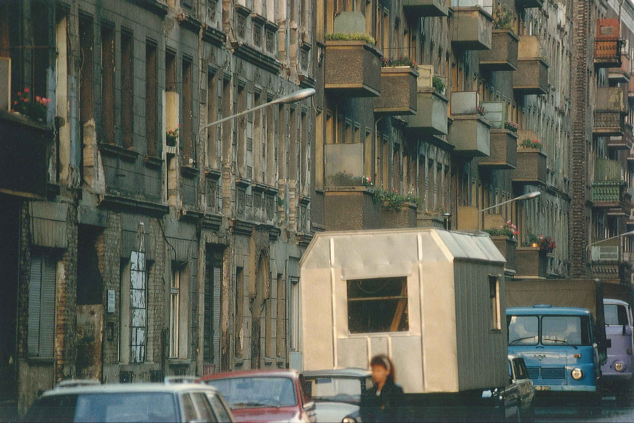 Sanierungsbereich Samariterviertel in Berlin-Friedrichshain, 1991, vor Sanierungsbeginn (Sanierungsträger STATTBAU)